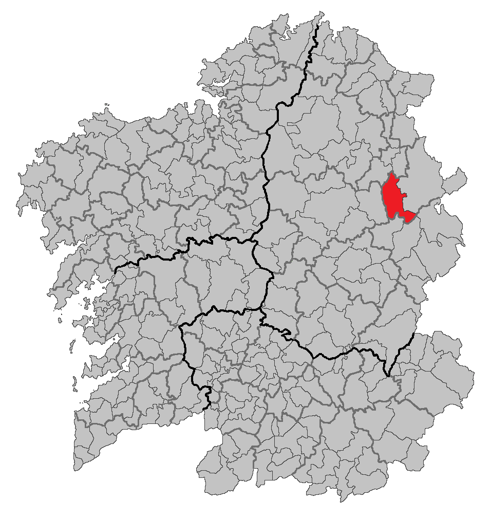 Mapa coa localización do concello de Baleira.